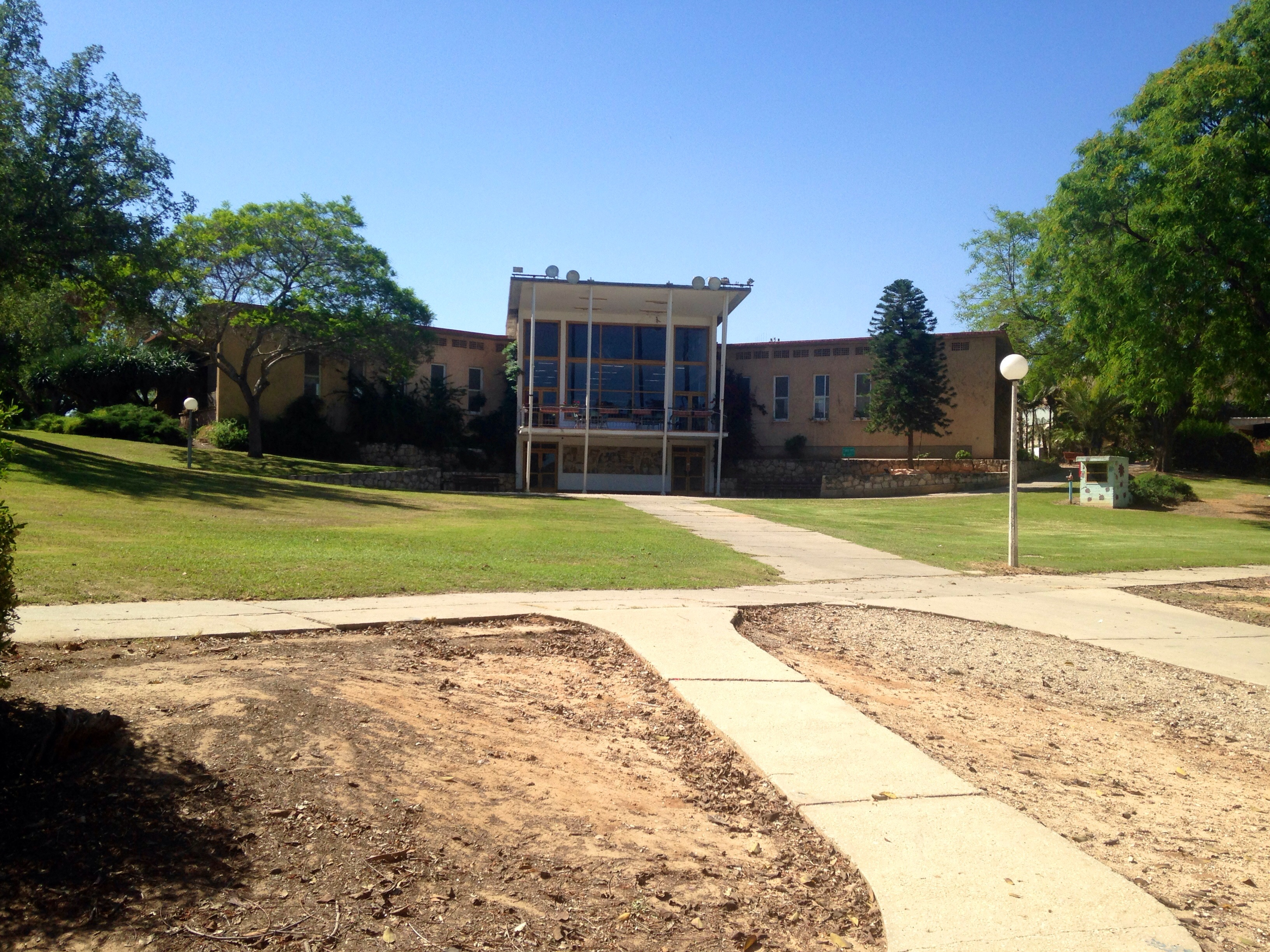 חדר האוכל של קיבוץ דורות במבט מכיוון צפונה